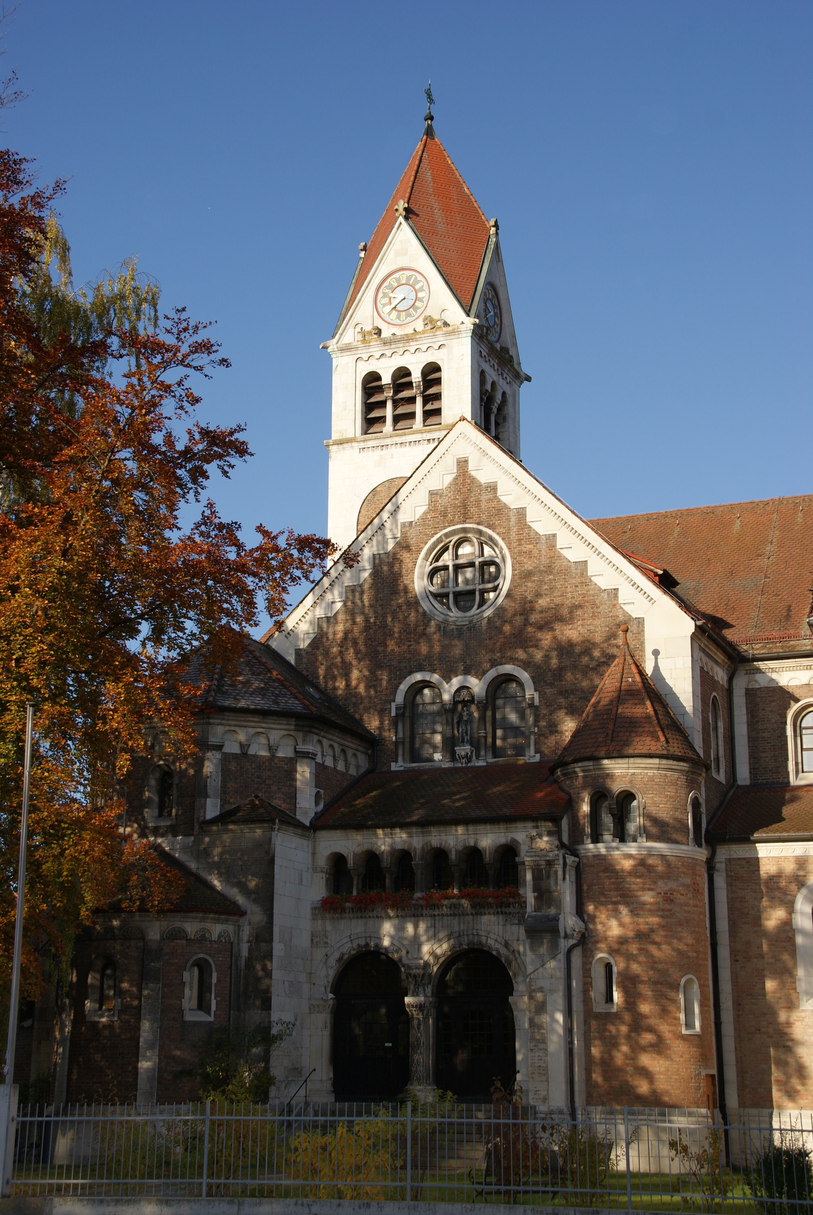 Kath. Pfarrkirche St. Cäcilia, dreischiffige Basilika mit eingezogenem Chor, Querhaus, Chorflankenturm und Freitreppe, Sichtziegel mit Hausteingliederungen, neuromanisch, 1899-1902 von Friedrich Niedermayer; mit Ausstattung